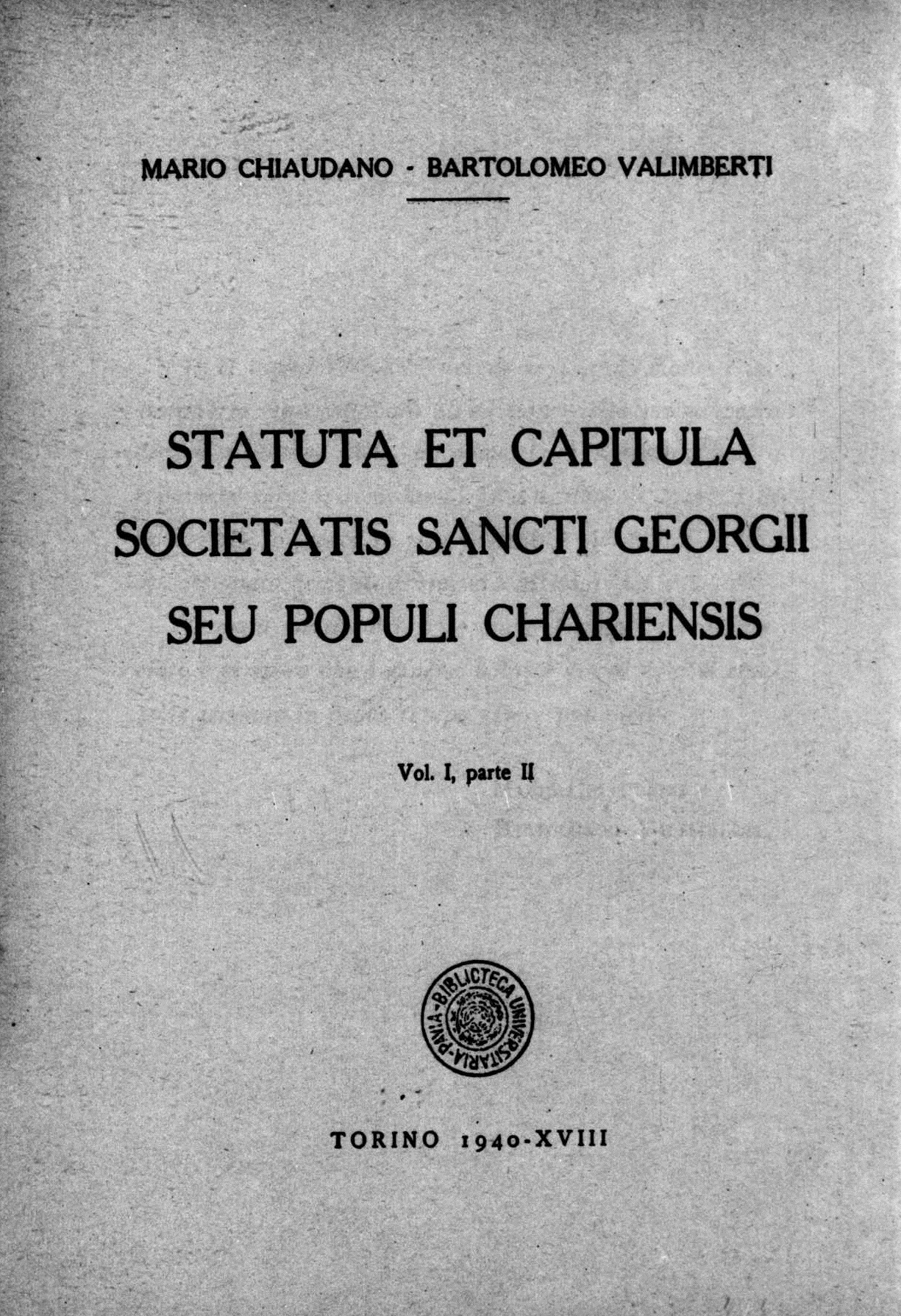 Frontespizio